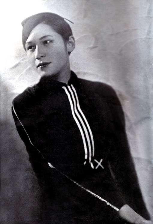 水の江瀧子（1936年）